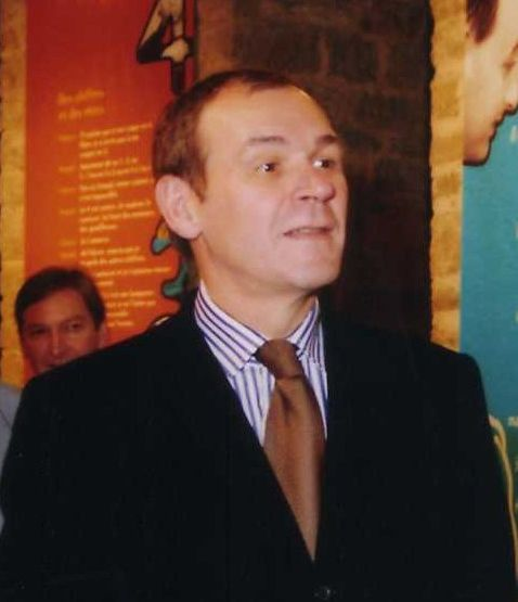 Jean-Jacques Aillagon, alors ministre de la Culture lors de l'inauguration, au Château d'eau-Château d'art, de la manifestation Art Culture et Handicap (19-20-21 octobre 2003).